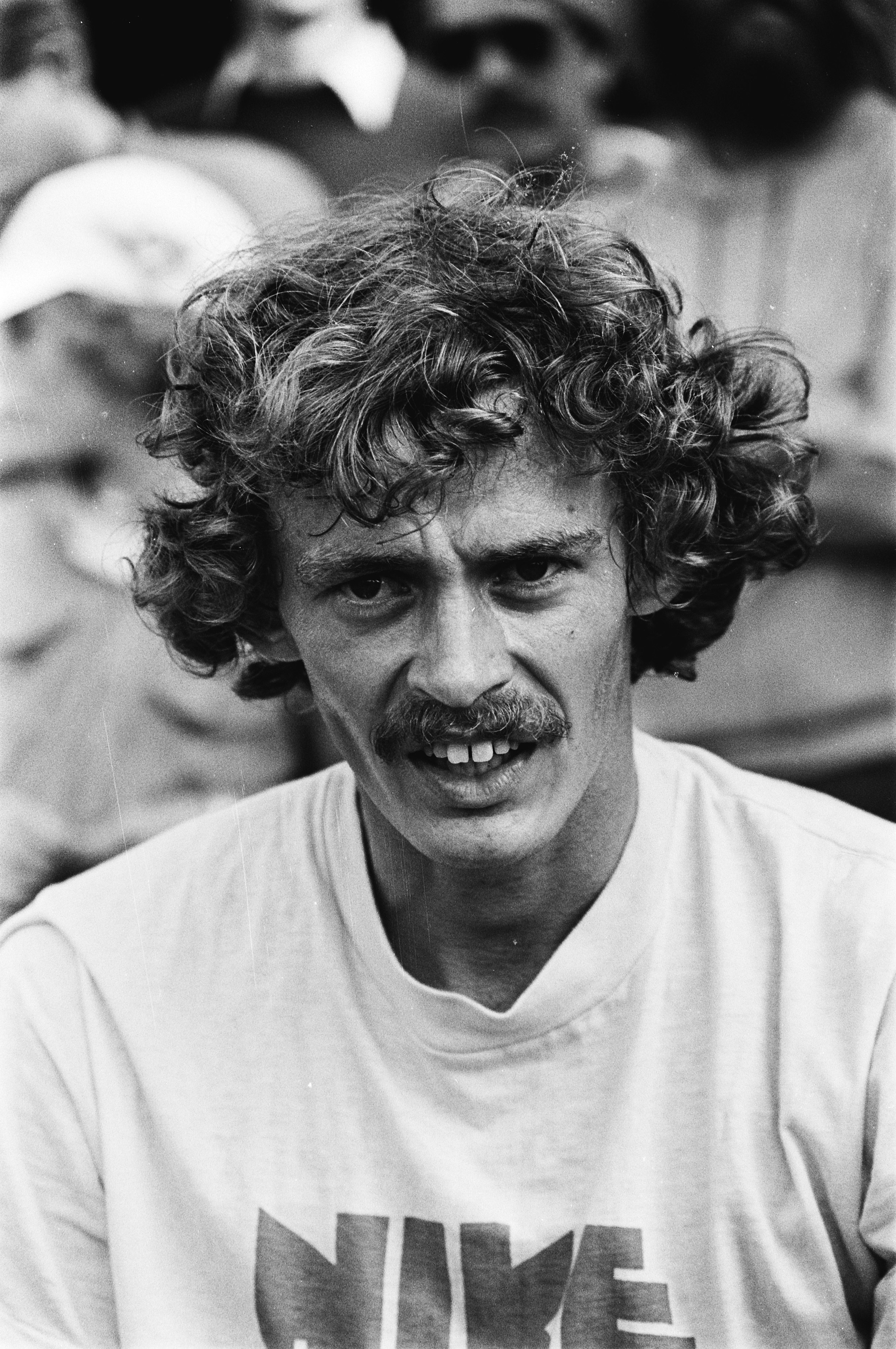 Collectie / Archief : Fotocollectie Anefo Reportage / Serie : Nederlandse Kampioenschappen Atletiek 1979, Nijmegen Beschrijving : Harry Schulting Datum : 11 augustus 1979 Locatie : Gelderland, Nijmegen Trefwoorden : atletiek, portretten, sport Persoonsnaam : Schulting, Harry Fotograaf : Suyk, Koen / Anefo Auteursrechthebbende : Nationaal Archief Materiaalsoort : Negatief (zwart/wit) Nummer archiefinventaris : bekijk toegang 2.24.01.05 Bestanddeelnummer : 930-3951